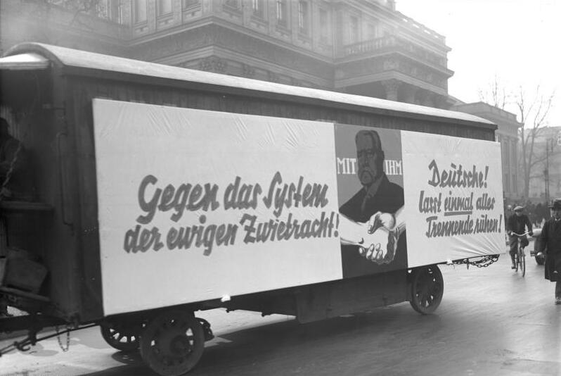 Reichspräsidentenwahl im April 1932. Möbelwagen als Wahlreklame "Gegen das System der ewigen Zwietracht Mit Ihm [Abbildung Paul von Hindenburg] Deutsche! Lasst einmal alles Trennende ruhen!"